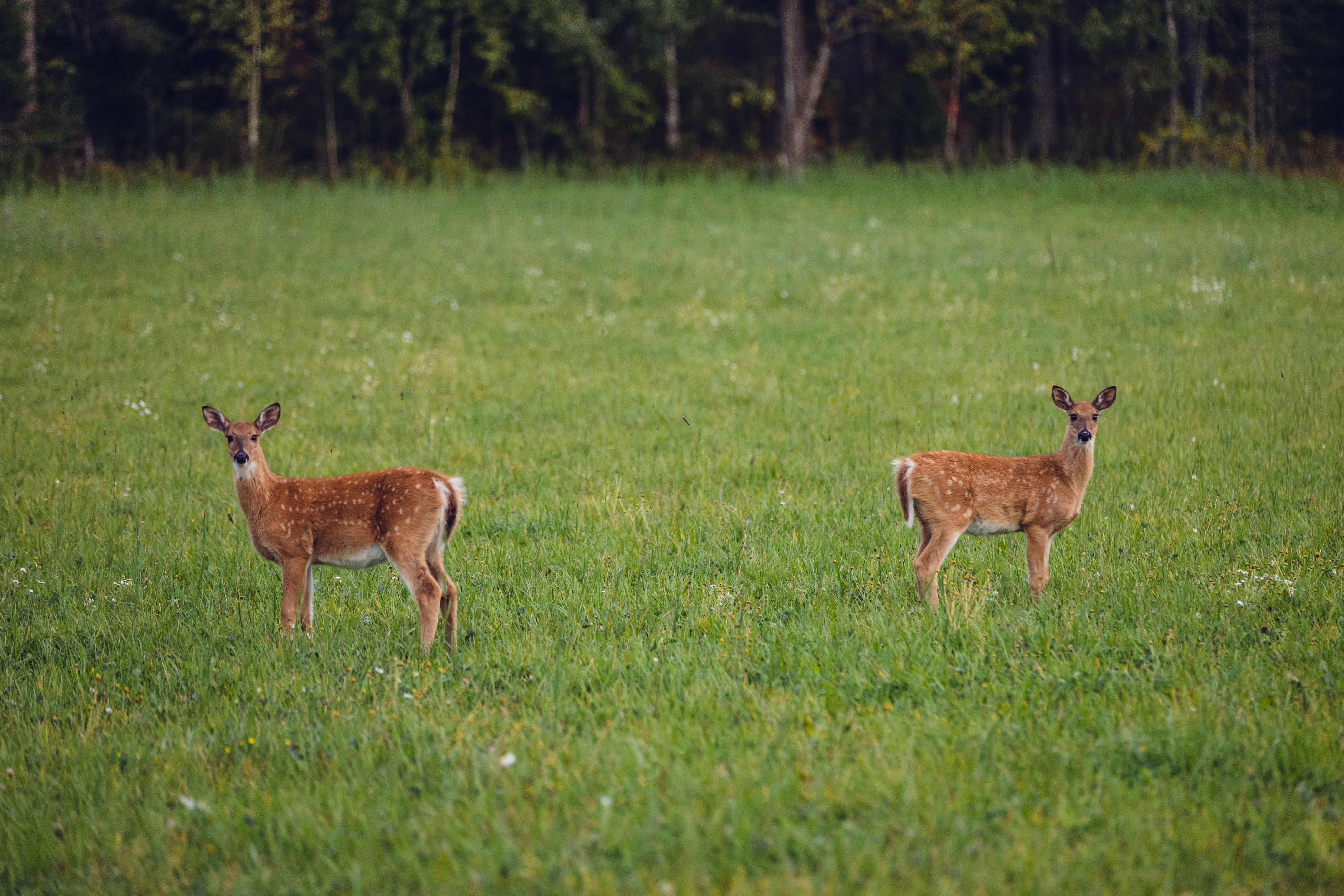 Hjortdjur dovhjortar i Nagu 2019